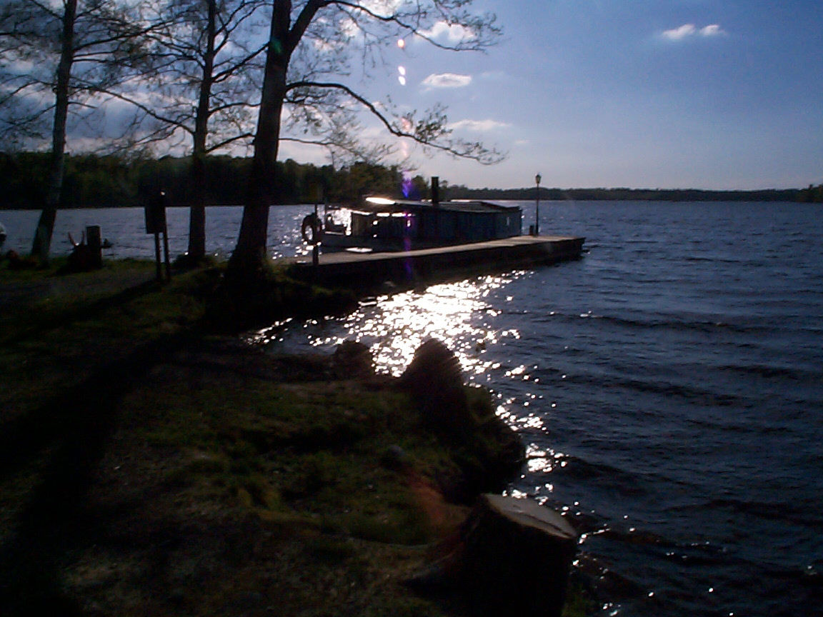 View over Helgasjön (lake Helga) in Sweden near Växjö